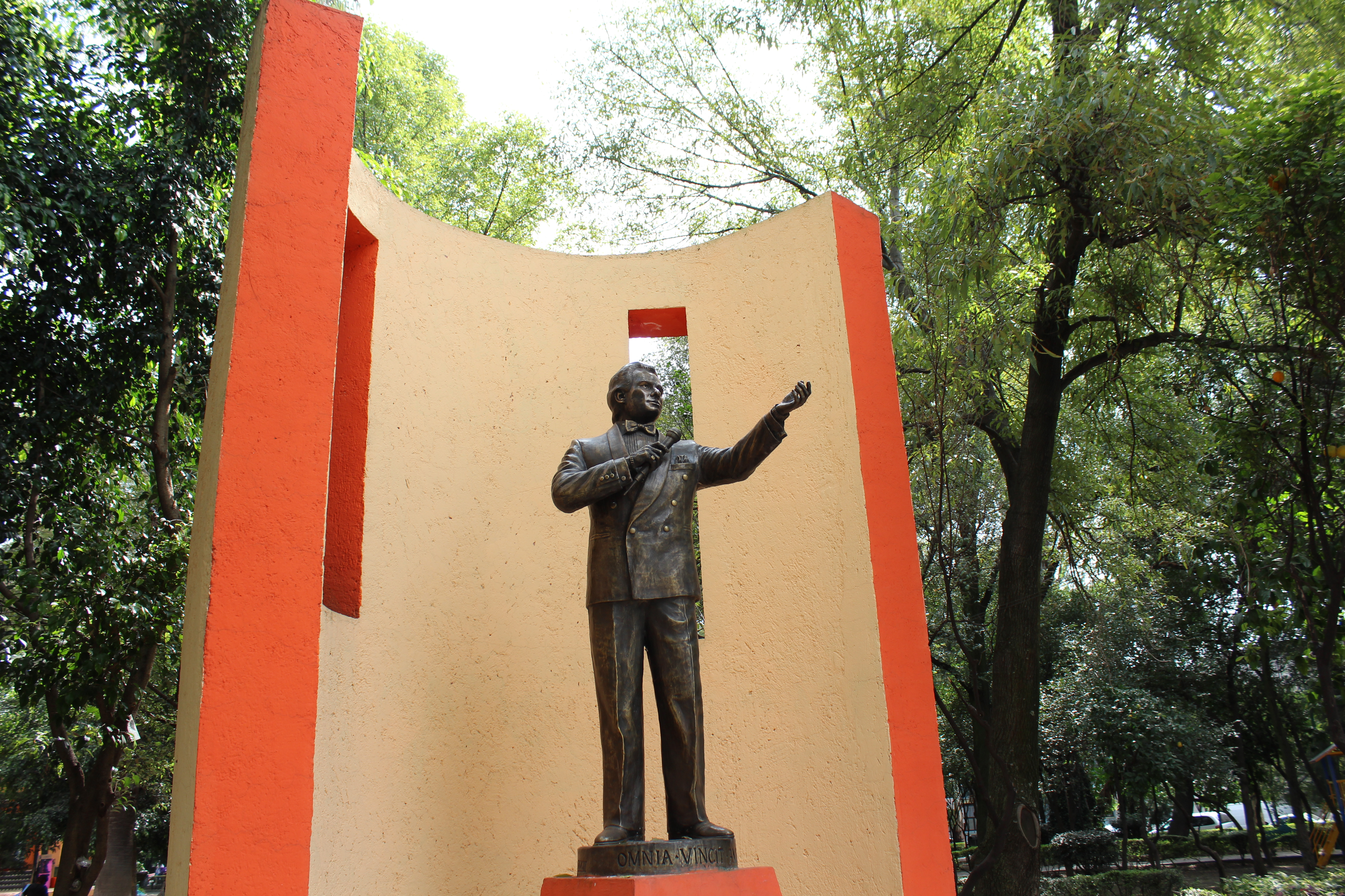 Monumento a José José en Clavería.